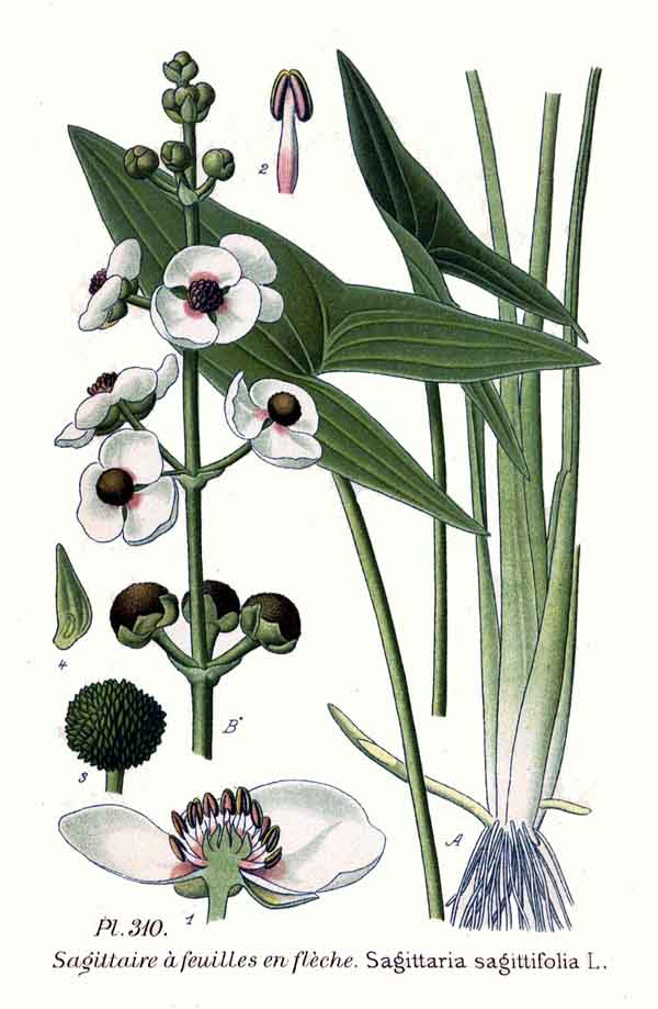 Sagittaria sagittifolia L.